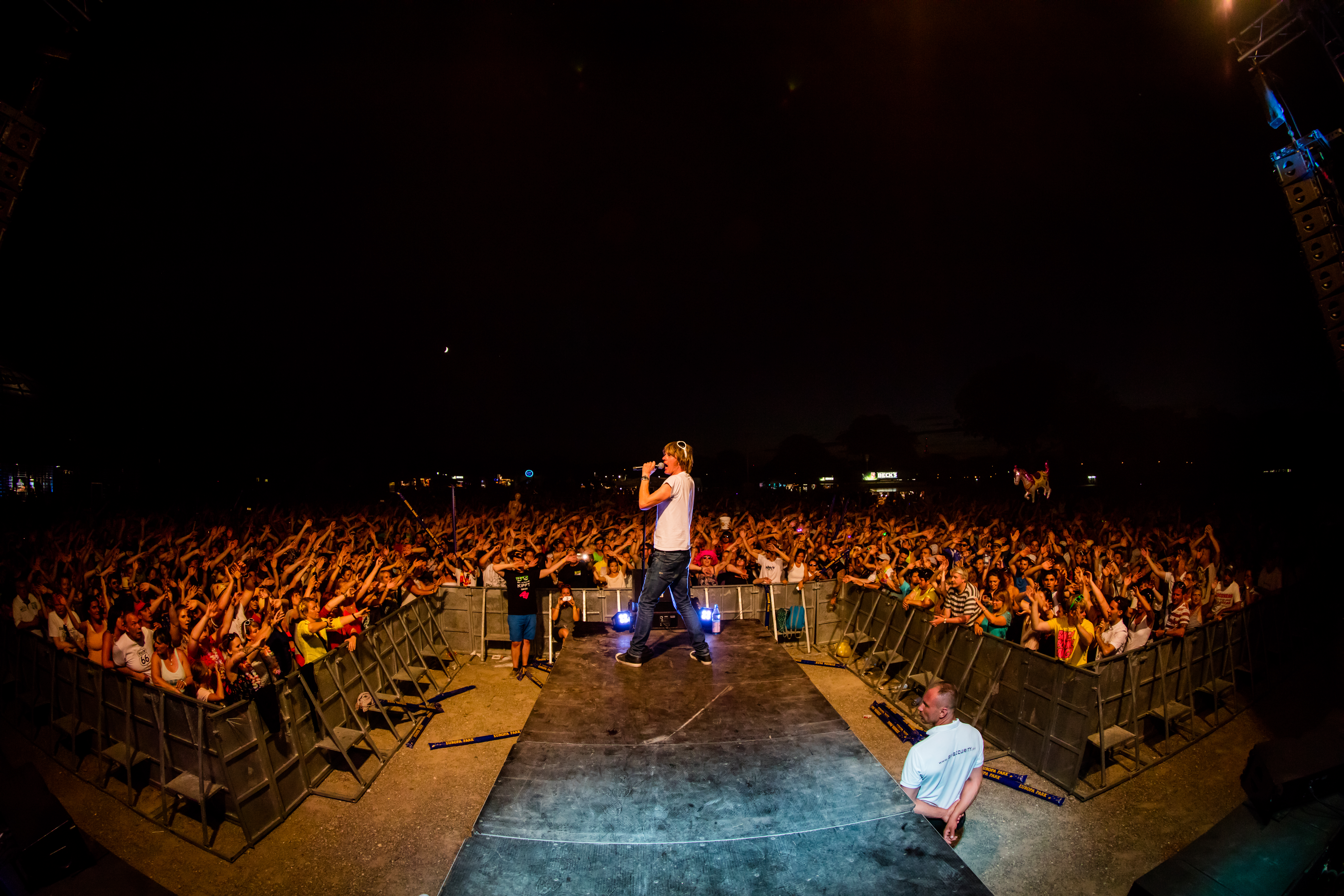 Mickie Krause during La Ola Mannheim at Maimarktgelände, Mannheim, Baden Württemberg, Germany on 2016-07-09, Photo: Sven Mandel